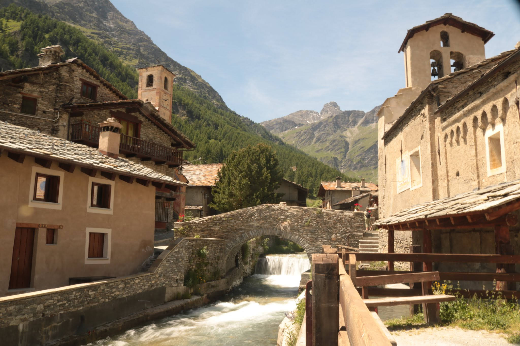 entrée du village de Chianale sur la commune de Pontechianale (Cuneo - Piémont - Italie)